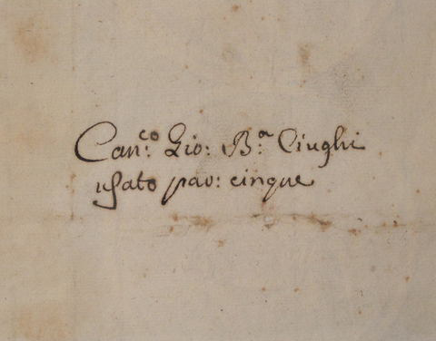 Firma originale del canonico Giovanni Battista Ciughi